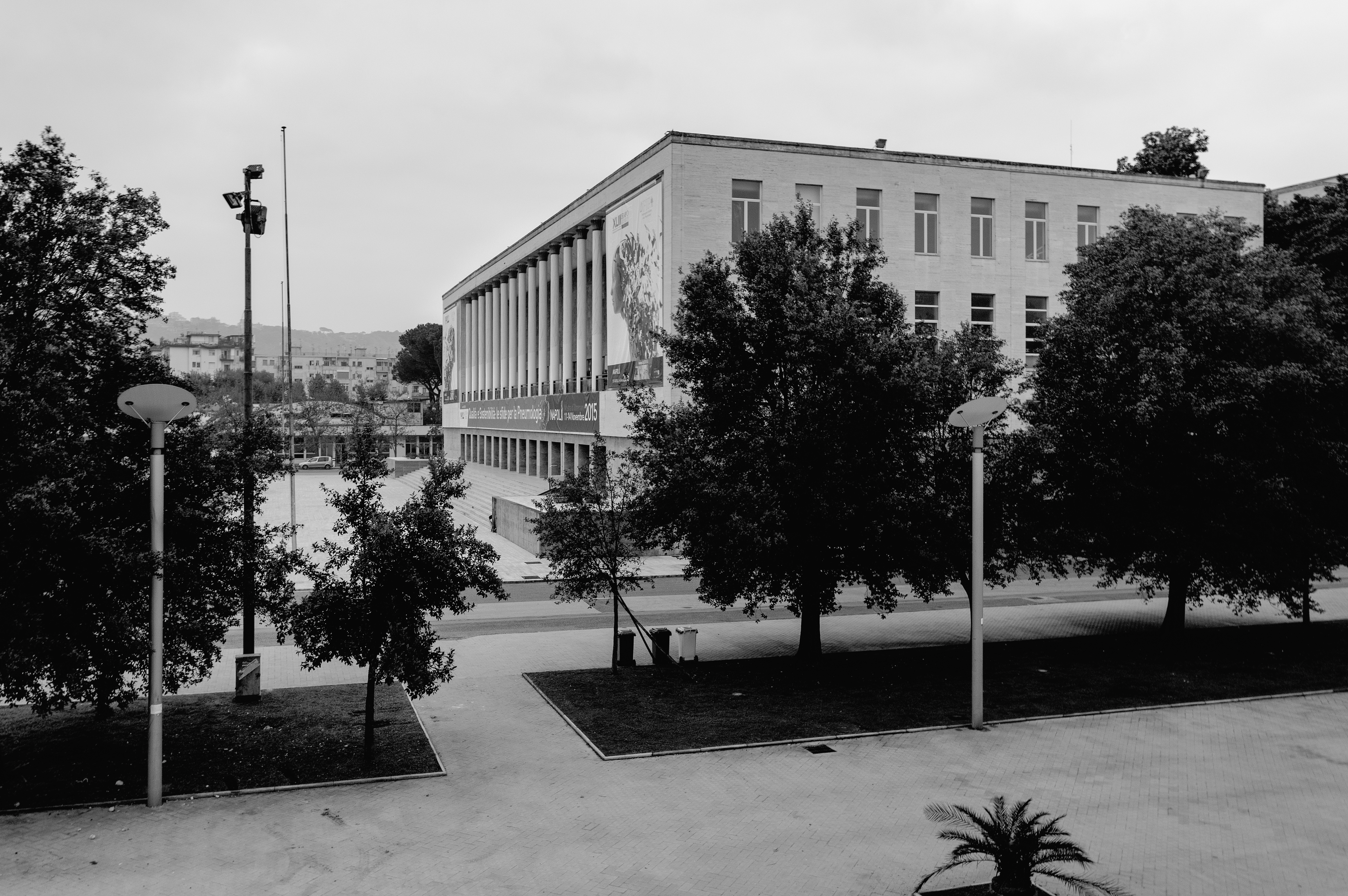 Il Teatro Mediterraneo visto dal ristorante.